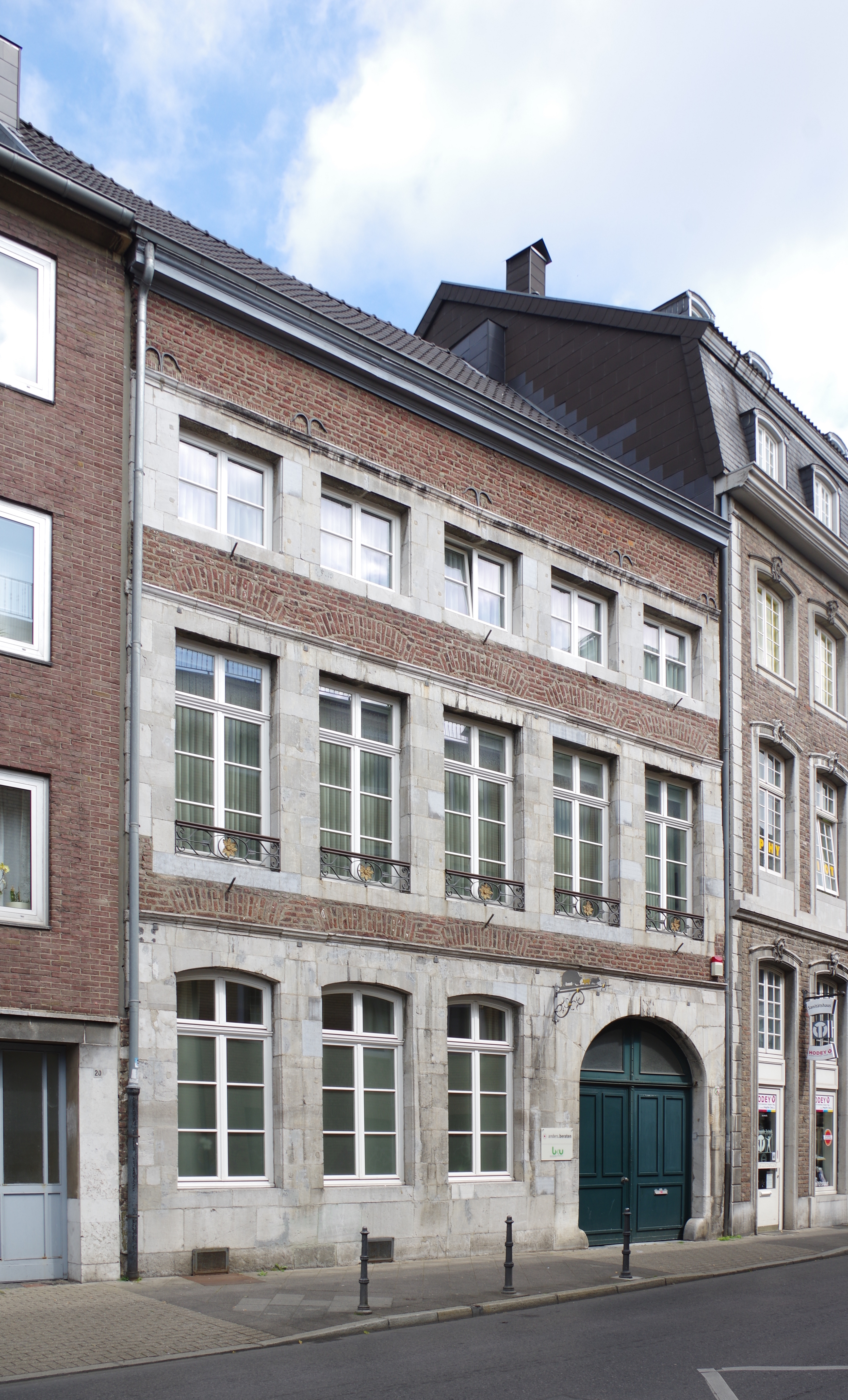 Aachen, Jakobstraße 18